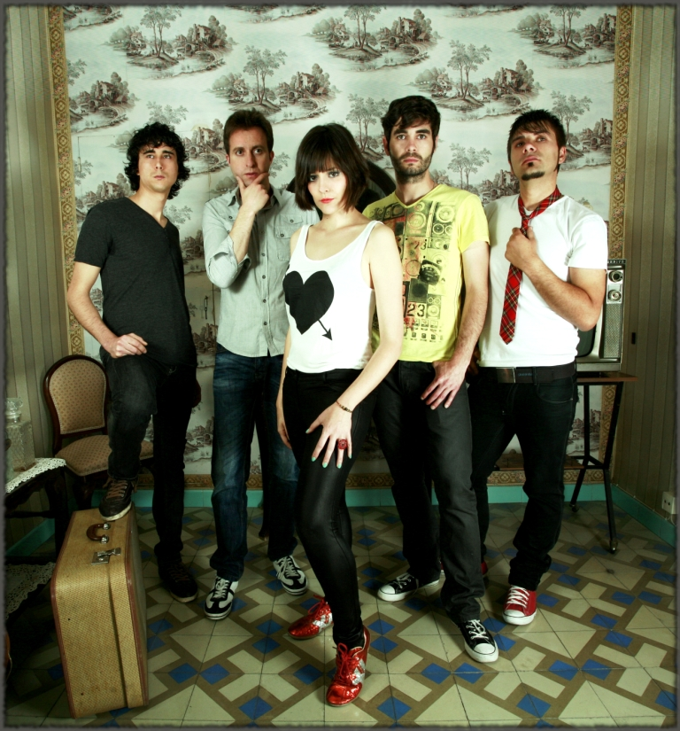 Mailers